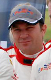 Michael Slater